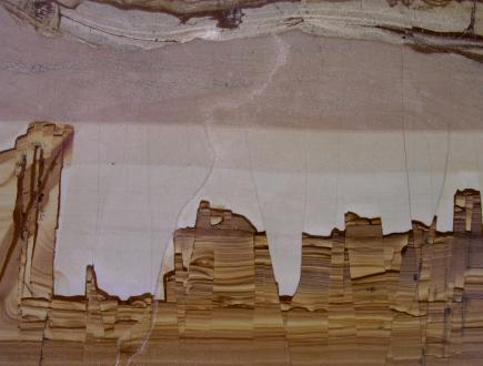 Ruinenmarmor aus Paesina / Italien